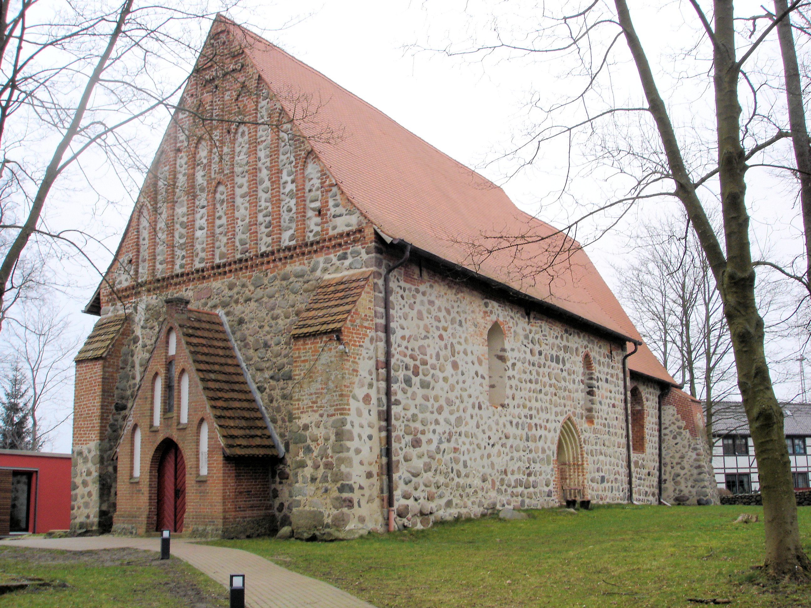 Kirche in Vilz bei Tessin (Mecklenburg) / Church in Vilz near Tessin (Mecklenburg-Western Pomerania)